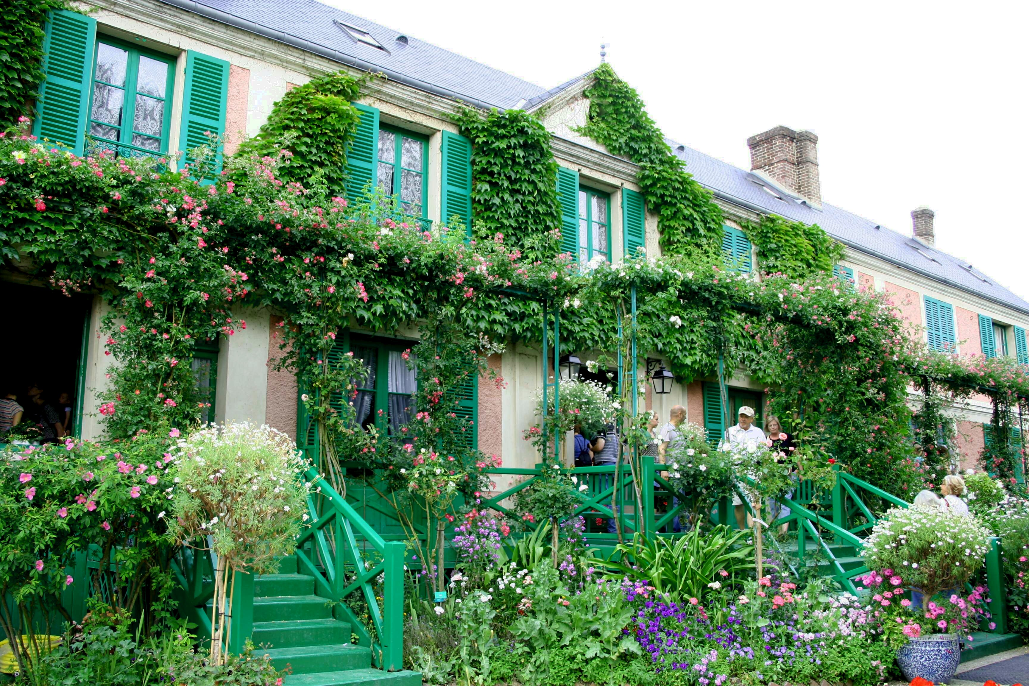 Maison de Claude Monet à Giverny - Eure (France)